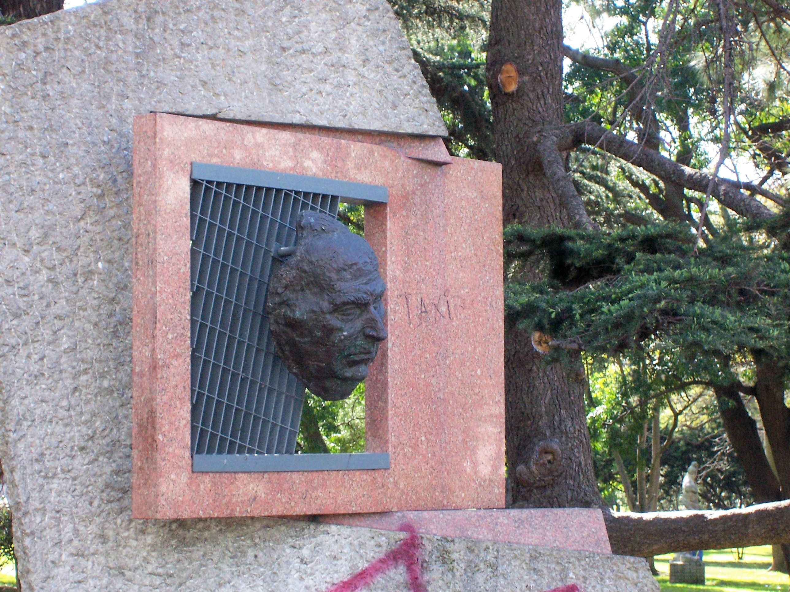 Monumento en homenaje al actor Alberto Candeau, ubicado en la zona del Obelisco a los Constituyentes de 1830. En este lugar se leyó una proclama en el denominado Acto del Obelisco (1983), manifestación pública de envergadura realizada a finales de la dictadura en Uruguay (1973-1985), cuando se realizó un acto recordatorio de la fecha en la que hubieran debido realizarse elecciones, bajo la consigna "Todos juntos por libertad, trabajo y democracia".